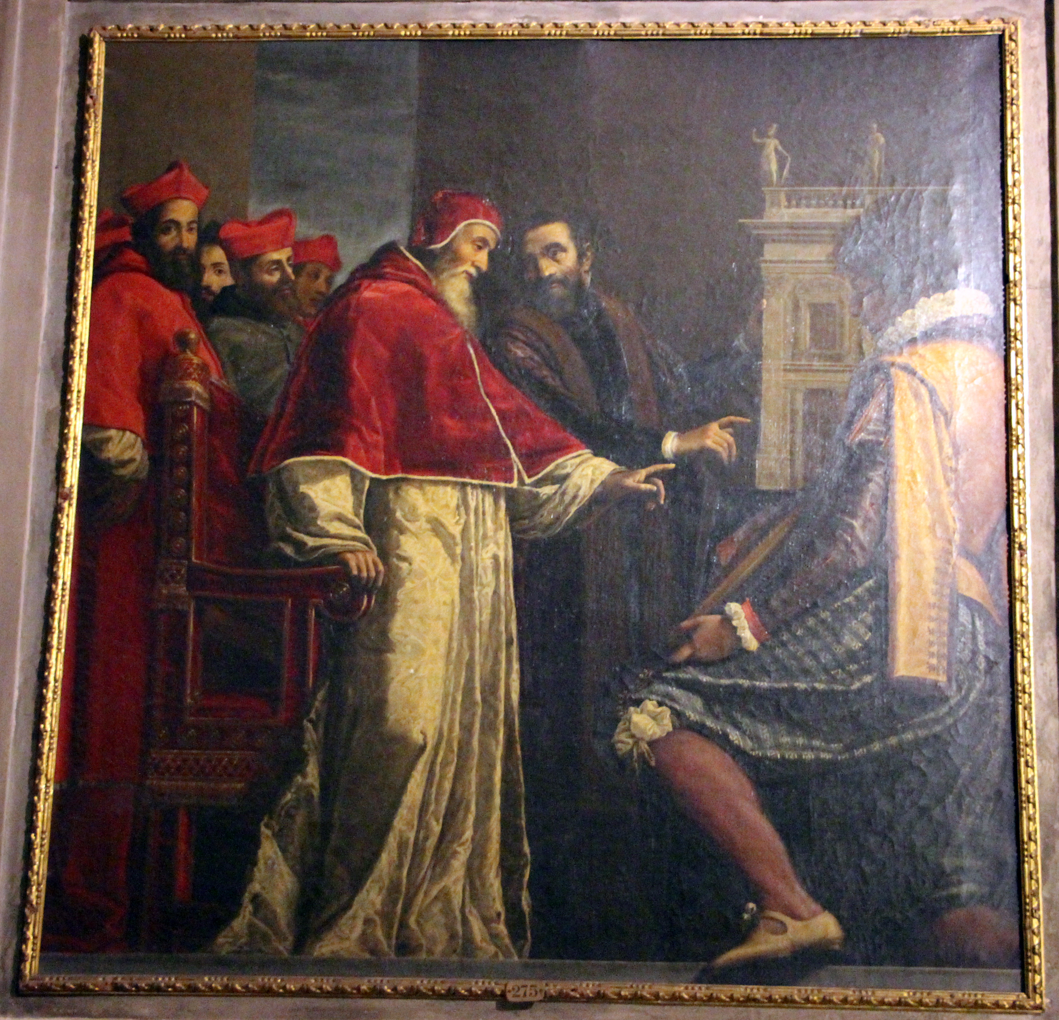 Casa Buonarroti - Galleria